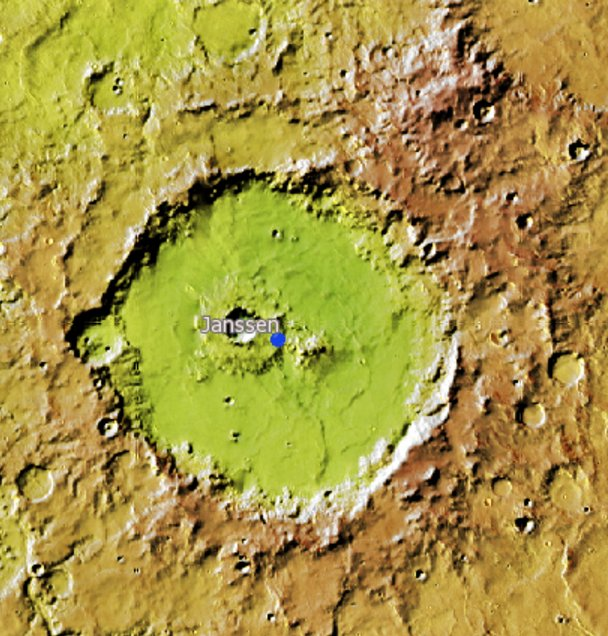 Cráter marciano Janssen. (Imagen IAU/USGS/Goddard/A SU/USGS)